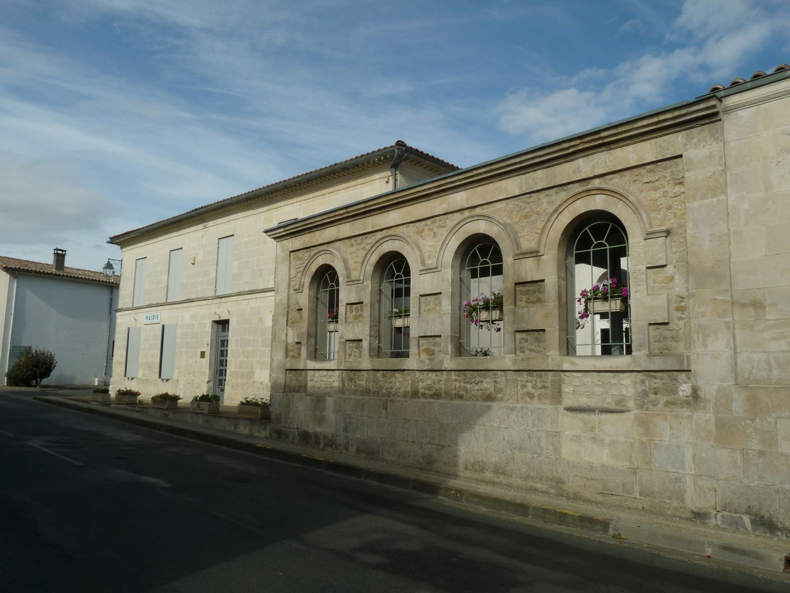 mairie d'Epargnes (17), France